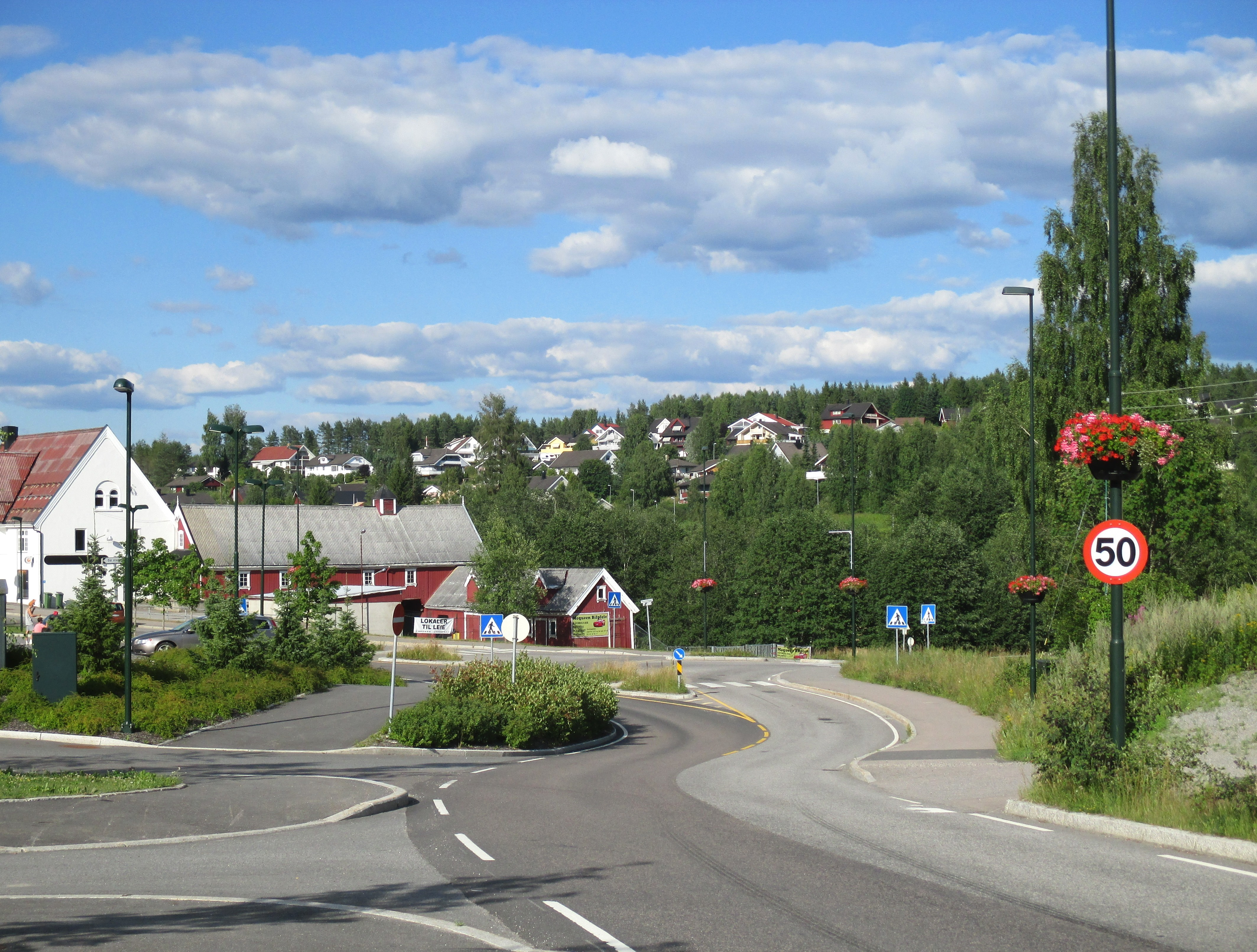 Fylkesvei 503 øst for Dal stasjon